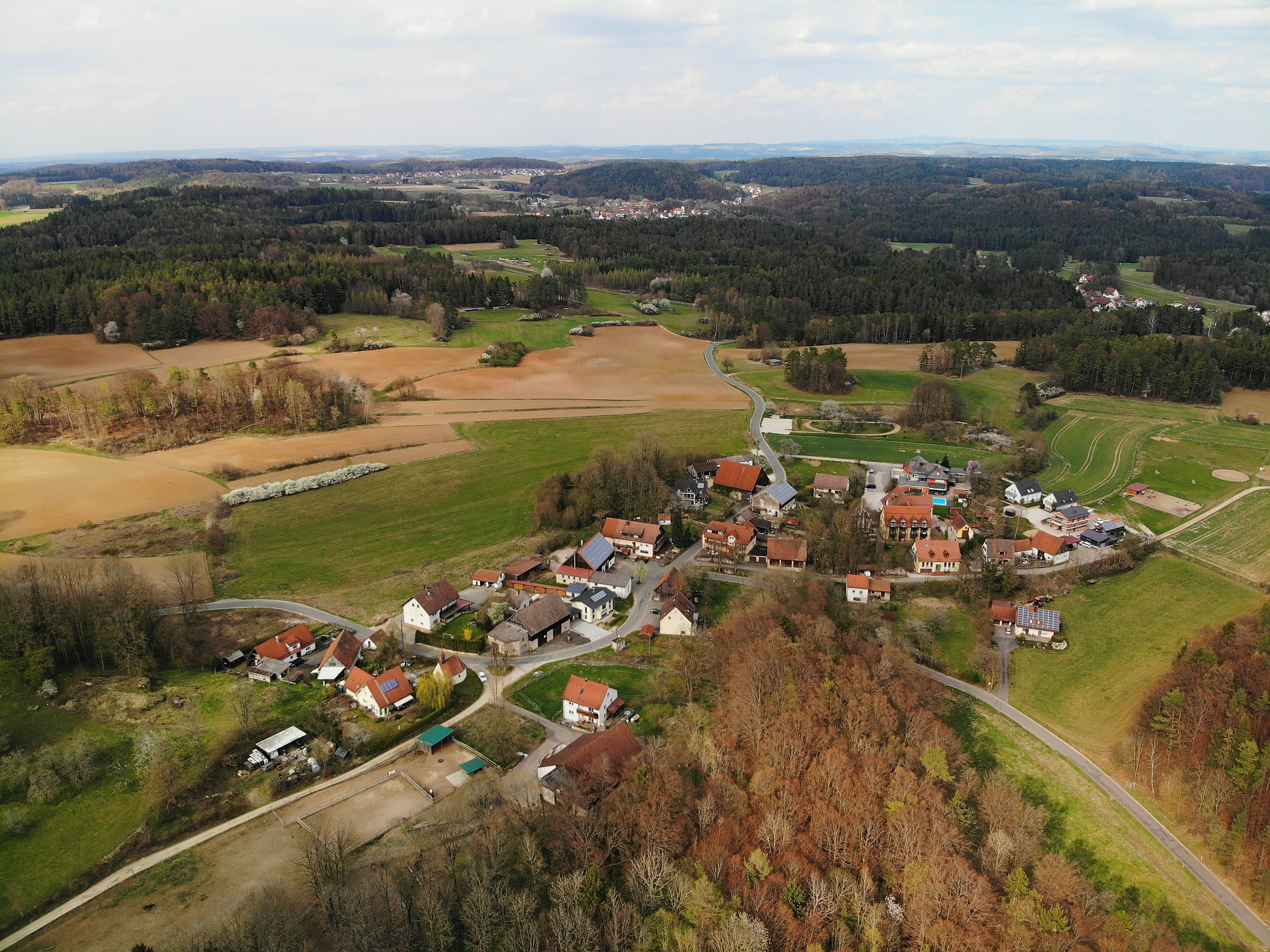 Hundsdorf (Obertrubach) Luftaufnahme (2020)